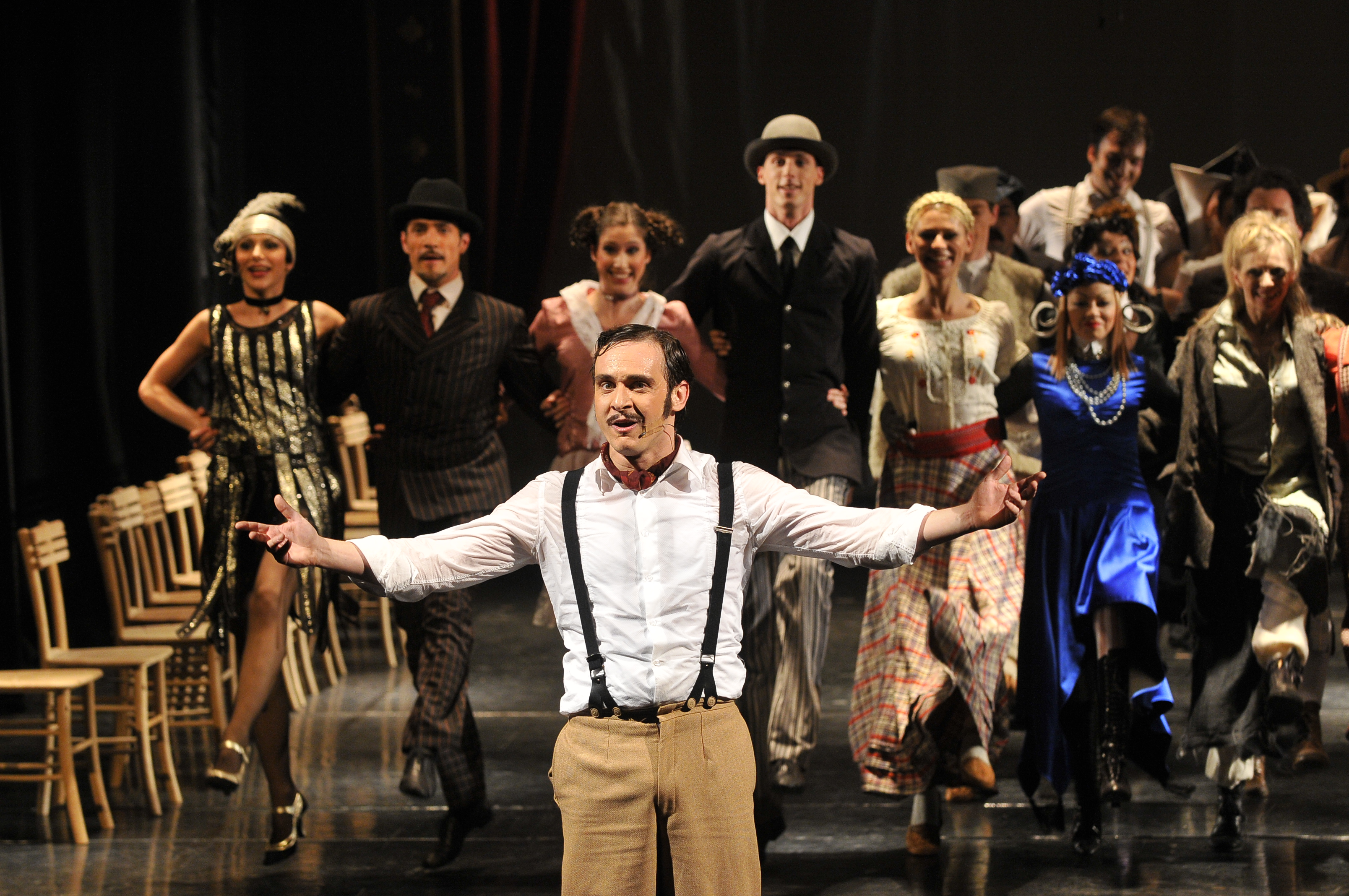 Premijera predstave "Maratonci trče počasni krug"